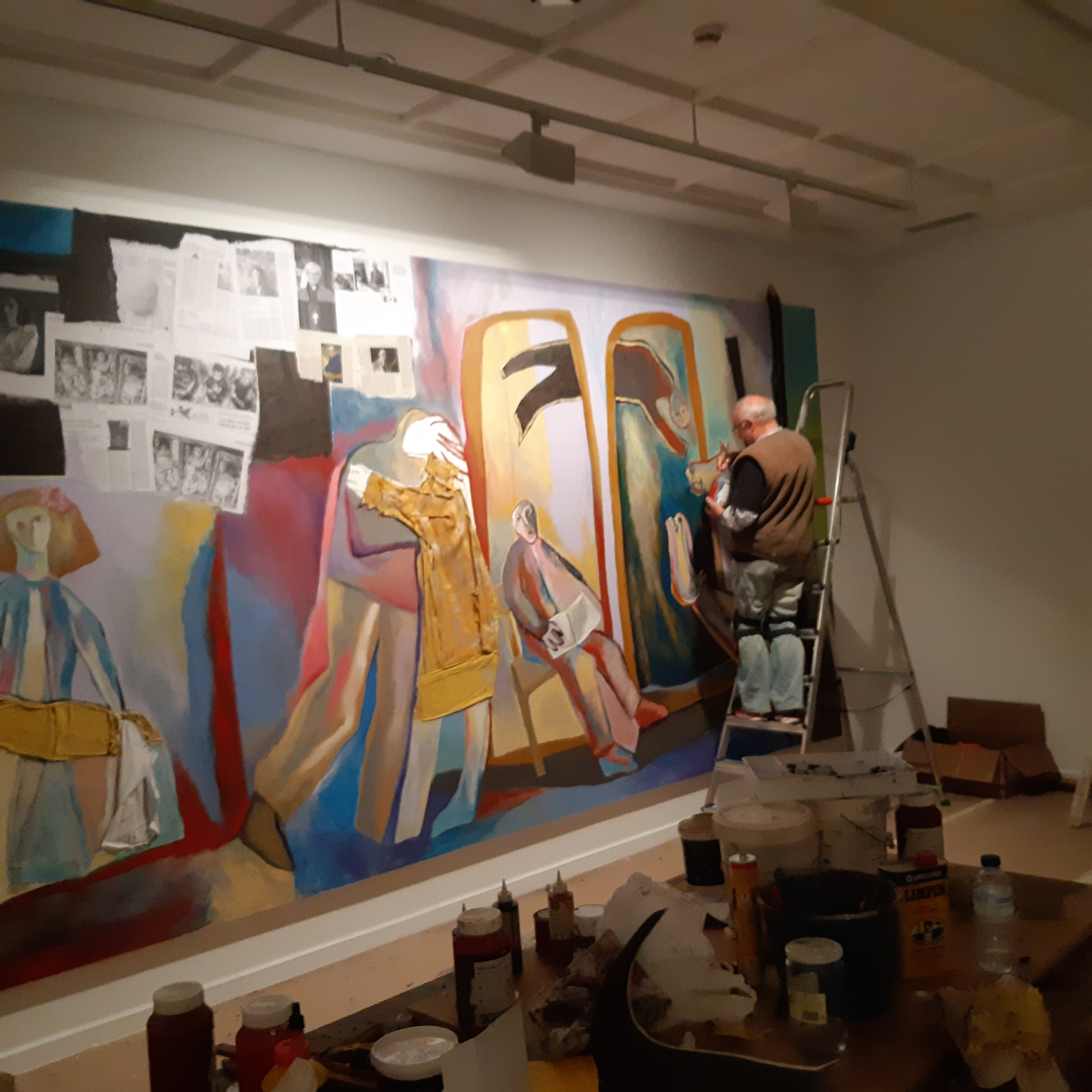 Xabier Egaña margolaria lanean, 2019an